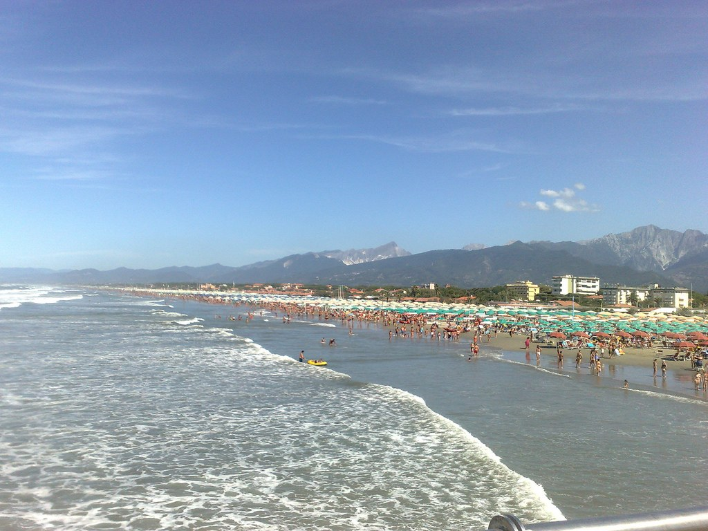 Marina di Pietrasanta, Toscana - Italia.